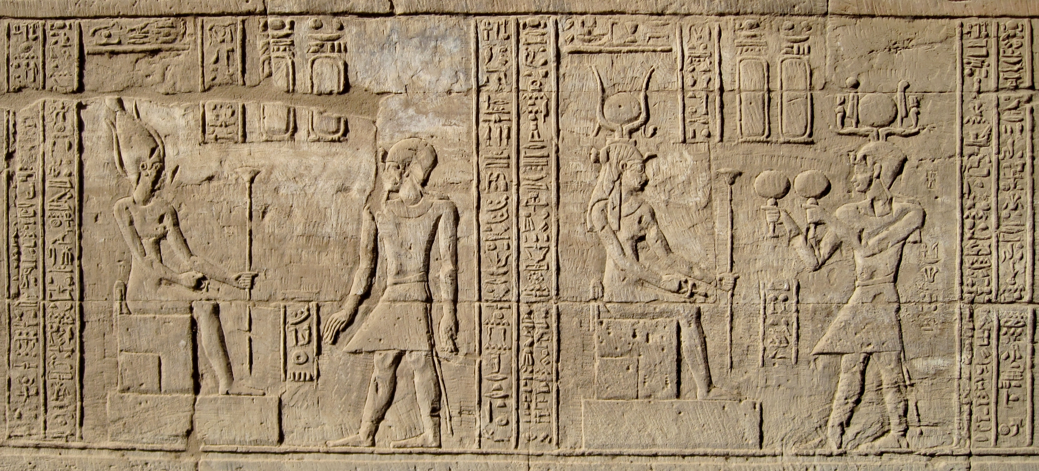 Relief im Innenraum des ptolemäischen Pronaos des Month-Tempels von el-Tod, Ägypten